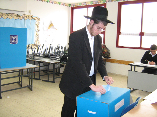 הצבעה בקלפי